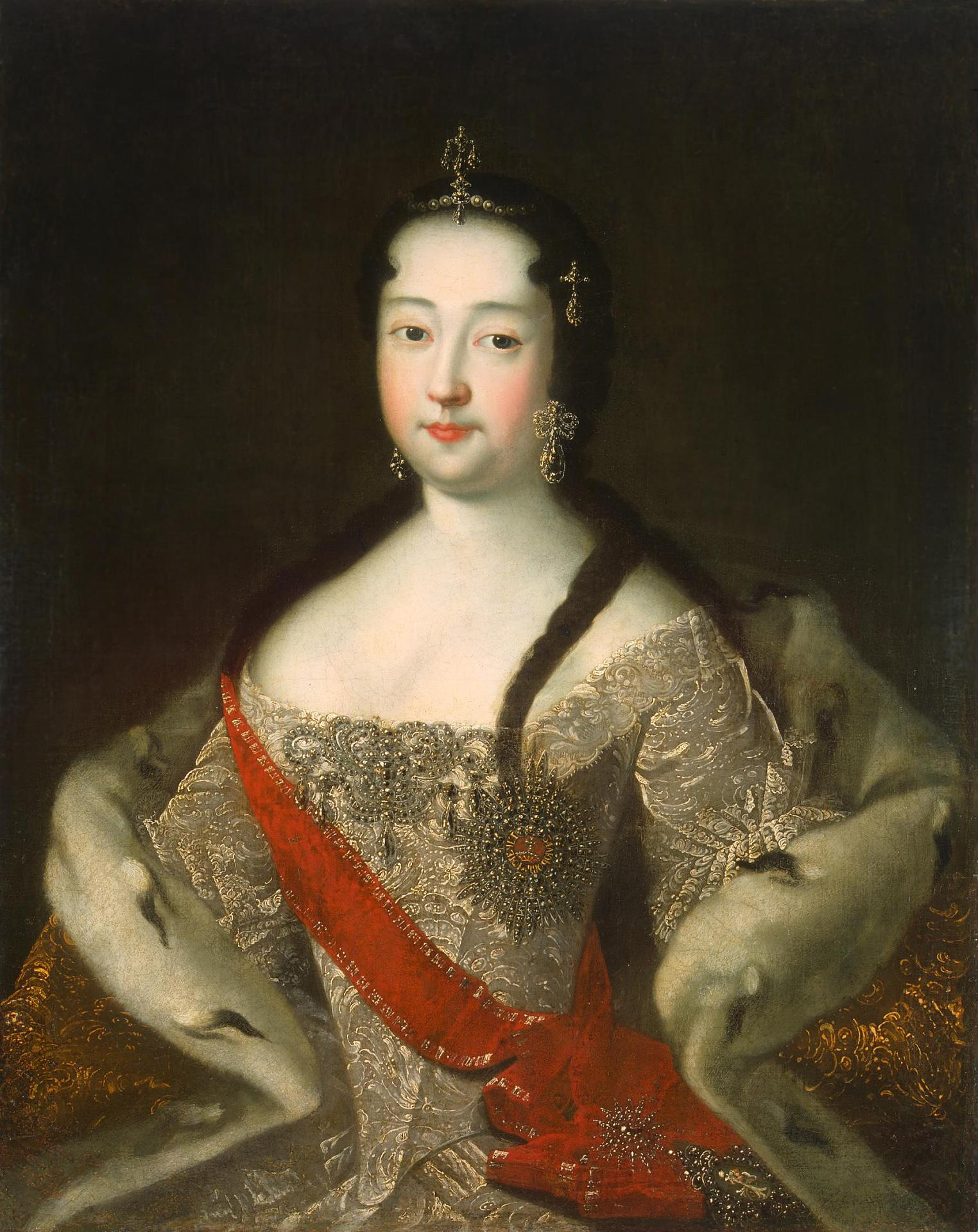 Цесаревна Анна Петровна. После 1721. Худ. И.Г.Адольский (Одольский). Государственный Эрмитаж. Санкт-Петербург. «Портрет царевны Анны Петровны» После 1740 г. Холст, масло. 88,2x71,0. Ранее ошибочно считался изображением вел. кн. Екатерины Алексеевны, типа Гроота. Идентифицирован на основании сравнения с портретами Анны Петровны. Атрибуция на основании сходства ряда живописных приемов подтверждена результатами технико-технологических исследований (ГЭ). Датирован Г. В. Дубининой (Москва) 1740-ми гг. по покрою платья и форме серег, с предположением, что портрет написан спустя годы после смерти цесаревны, после воцарения Елизаветы Петровны, любимой сестрой которой была изображенная. Эта гипотеза представляется правомерной, поскольку Анну Петровну И. Н. Адольский мог портретировать еще при жизни. Анна Петровна (1708—1728) — царевна, с 1721 г. — цесаревна, старшая дочь Петра I и Екатерины Алексеевны. С 1725 г. — жена герцога Голштейн-Готторпского Карла Фридриха. Мать императора Петра III. Изображена в серебряном парчовом платье и горностаевой мантии, со звездой и лентой ордена св. Екатерины, с аграфом на груди, с диадемой из жемчужин и драгоценных камней, с серьгами. Государственный Эрмитаж. Санкт-Петербург